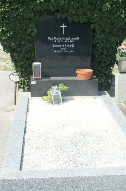 DorisMayer-Friedhof Döbling